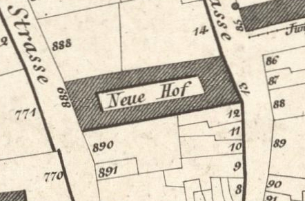 Der Neue Hof in Braunschweig 1829. Heute befindet sich hier der Handelsweg.